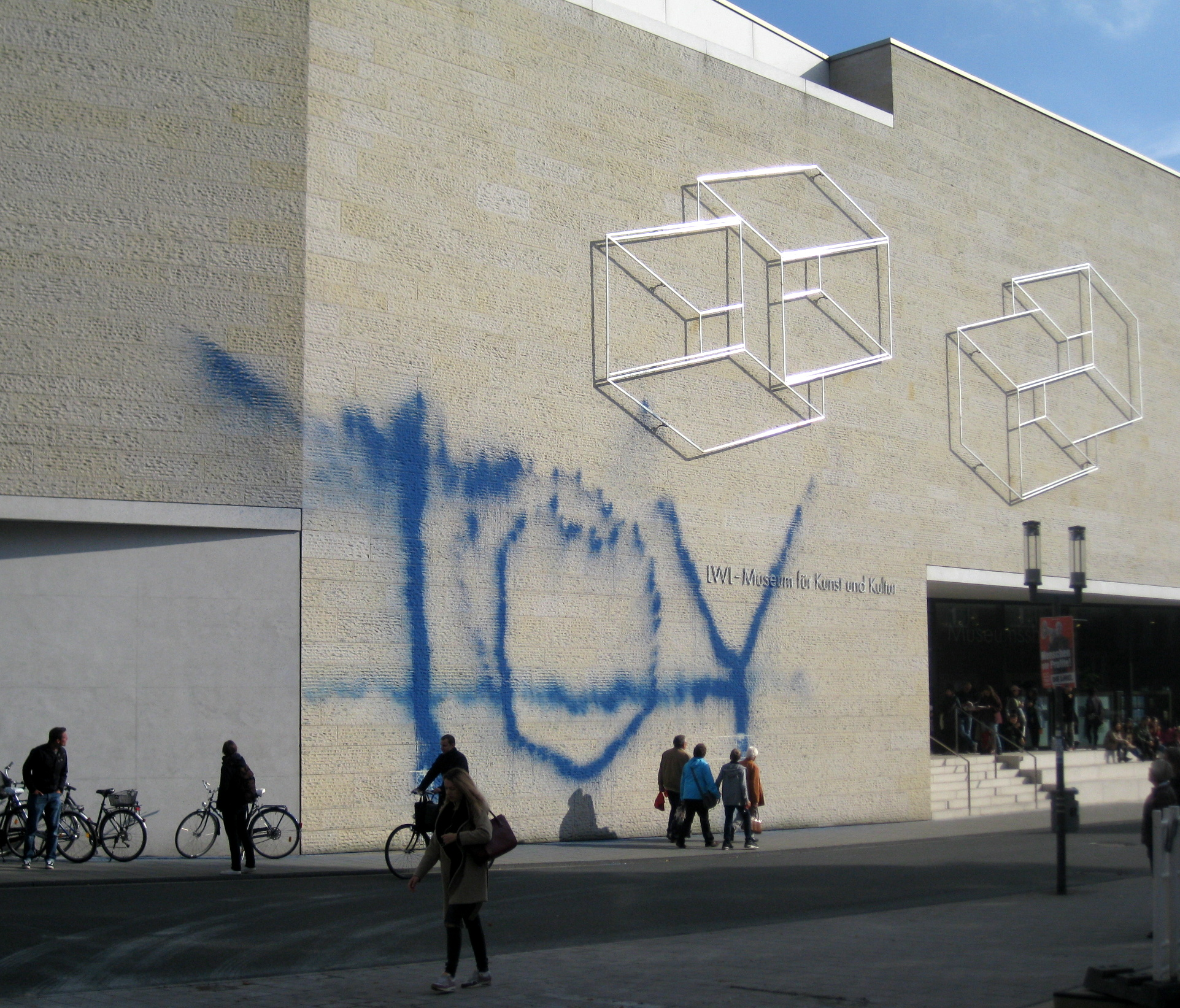 Neuer Standort am Standort "Pferdegasse" des LWL Museum Für Kunst und Kultur 2014